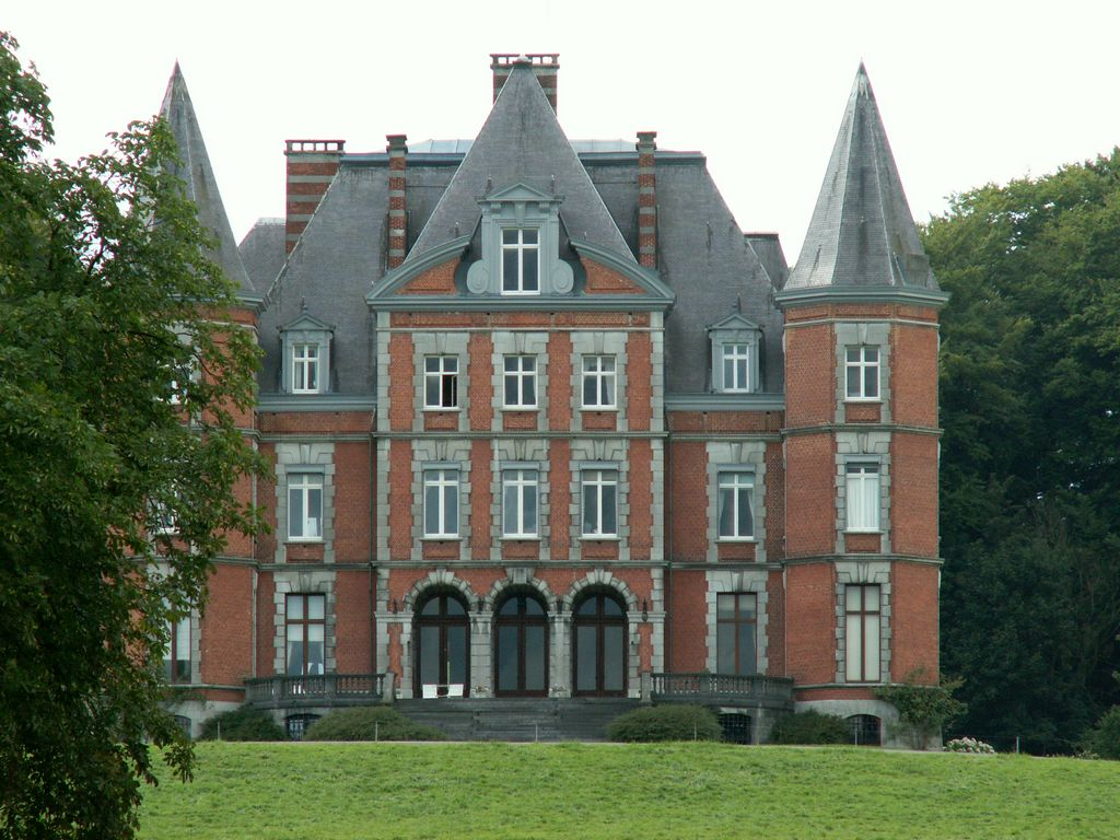 Château (privé) d'Ittre - Les photos de Badplayer